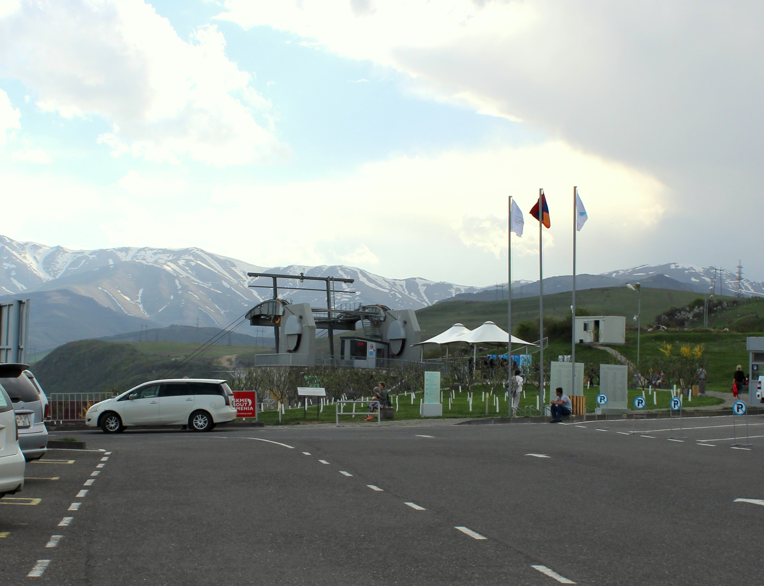 Տաթևեր ճոպանուղու «Հալիձոր» կայան